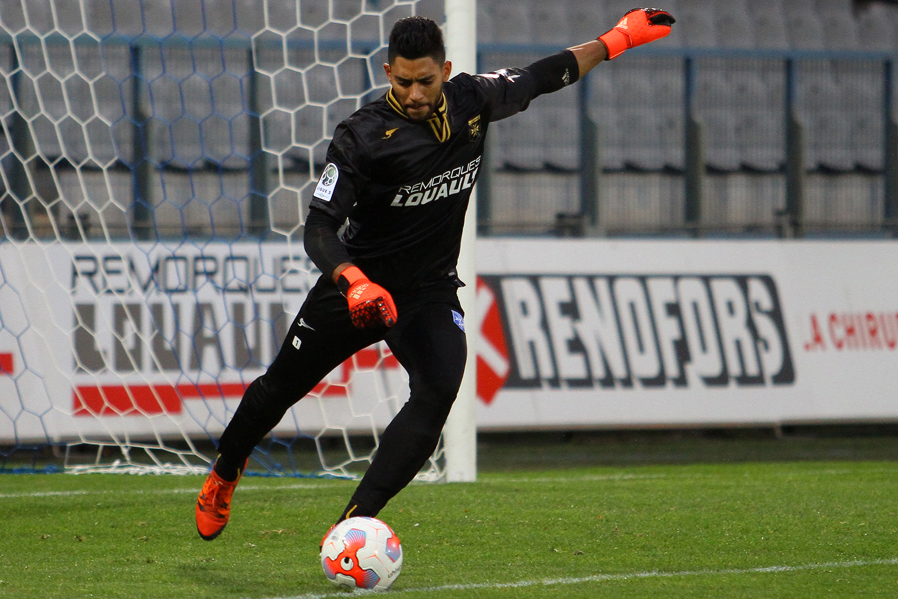 Zacharie Boucher